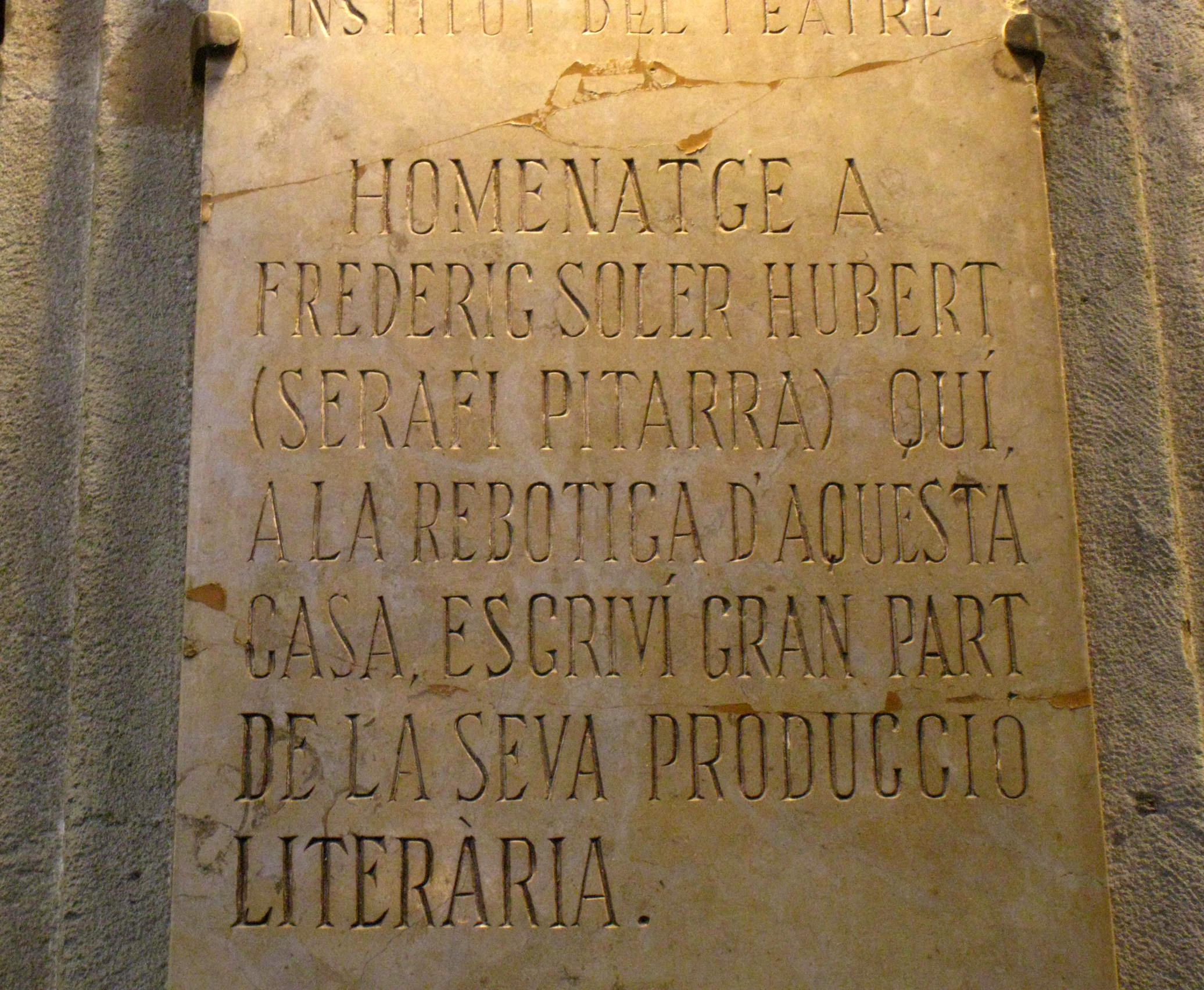 Frederic Soler (Serafí Pitarra). C. Avinyó, 56 (Barcelona)